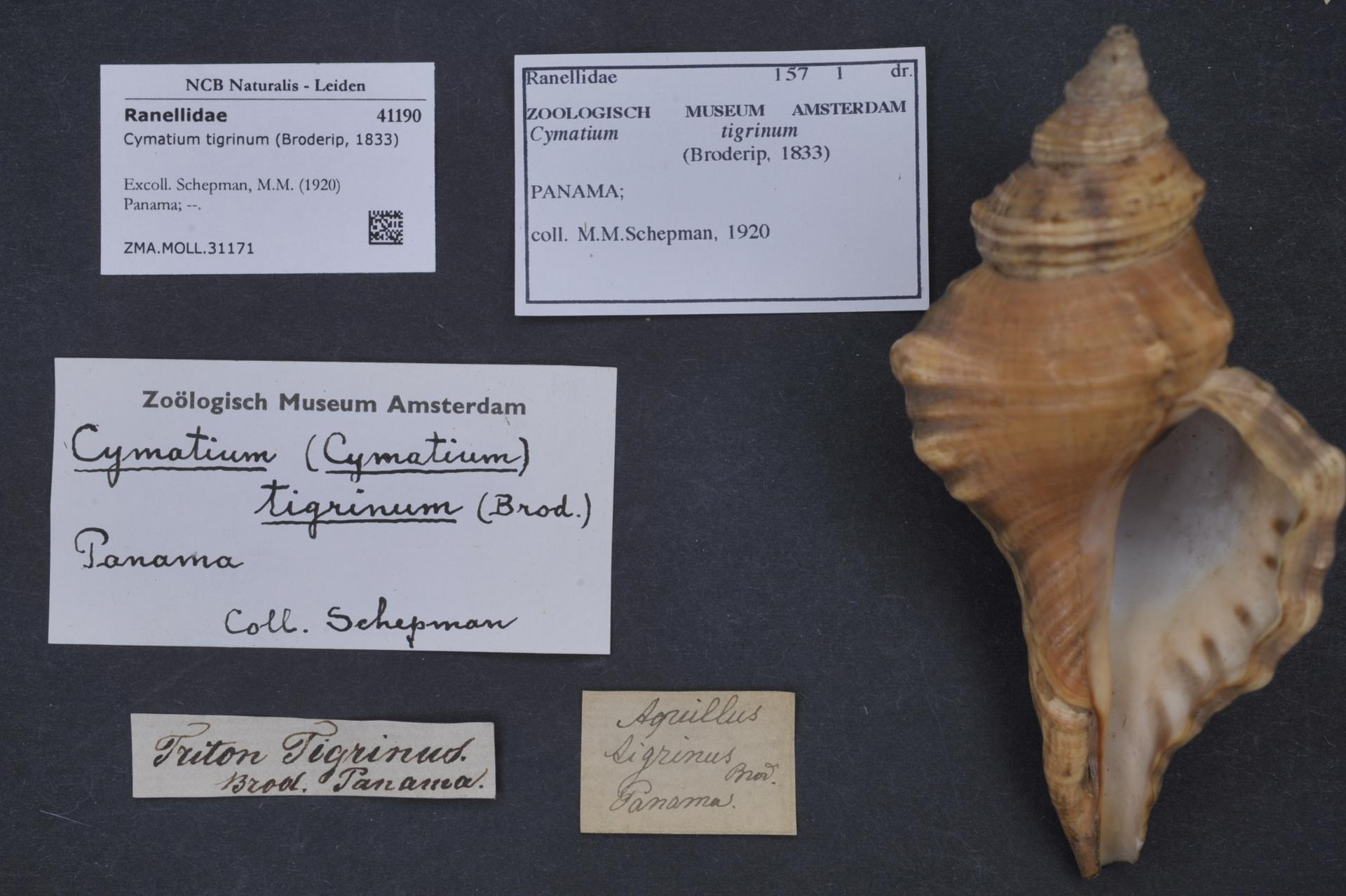 Cymatium tigrinum (Broderip, 1833)